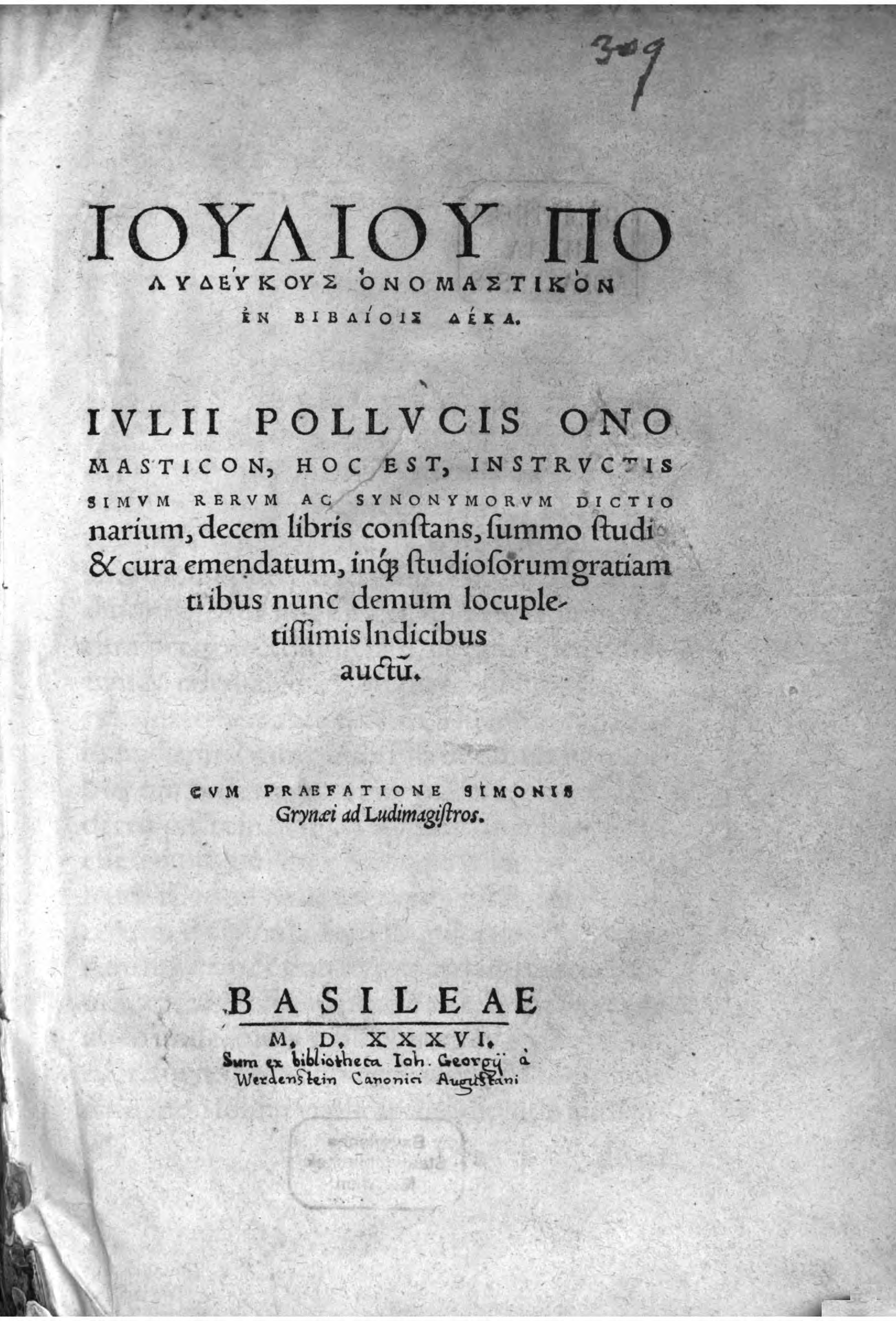 Юлий Поллукс. Ономастикон Титульный лист издания 1536 года